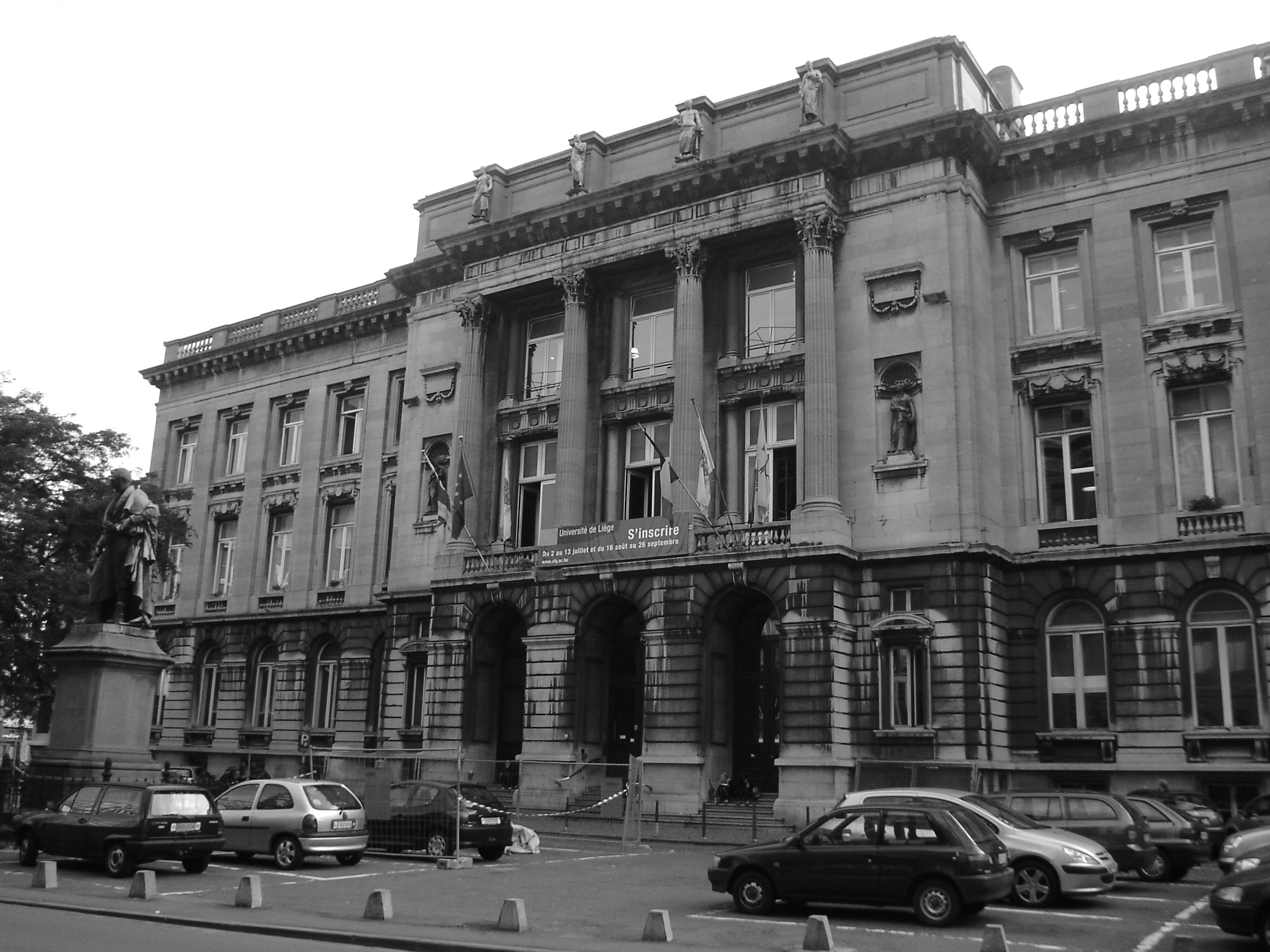 Université de Liège, Belgique